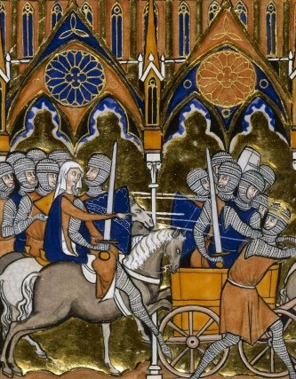 Débora, l'un des Juges d'Israël, envoie Barac au combat contre les Cananéens (cf le Livre des Juges, chapitre 4). Miniature extraite du Psautier de saint Louis.